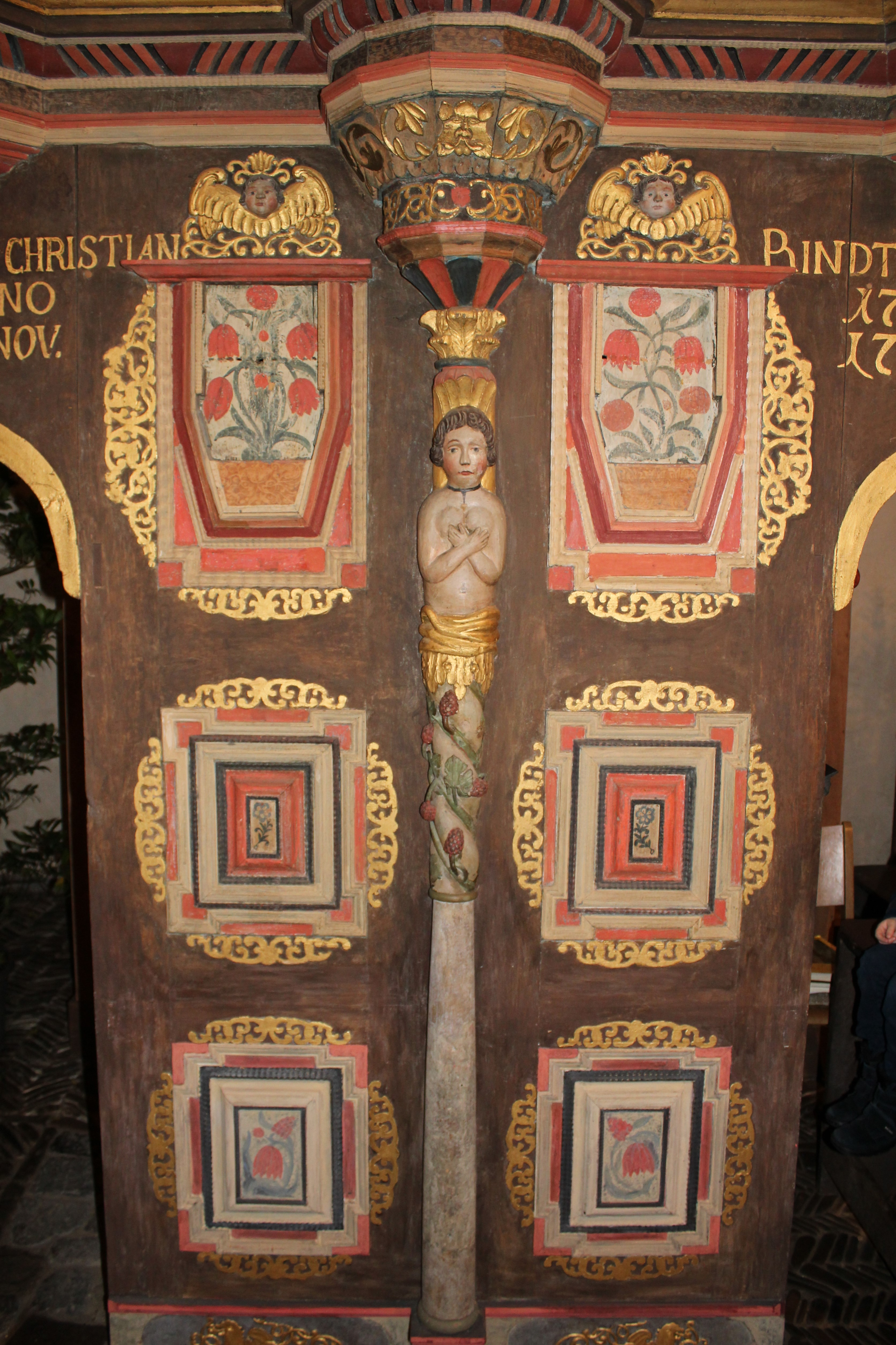 Orgel in der Emmauskapelle Hatzfeld